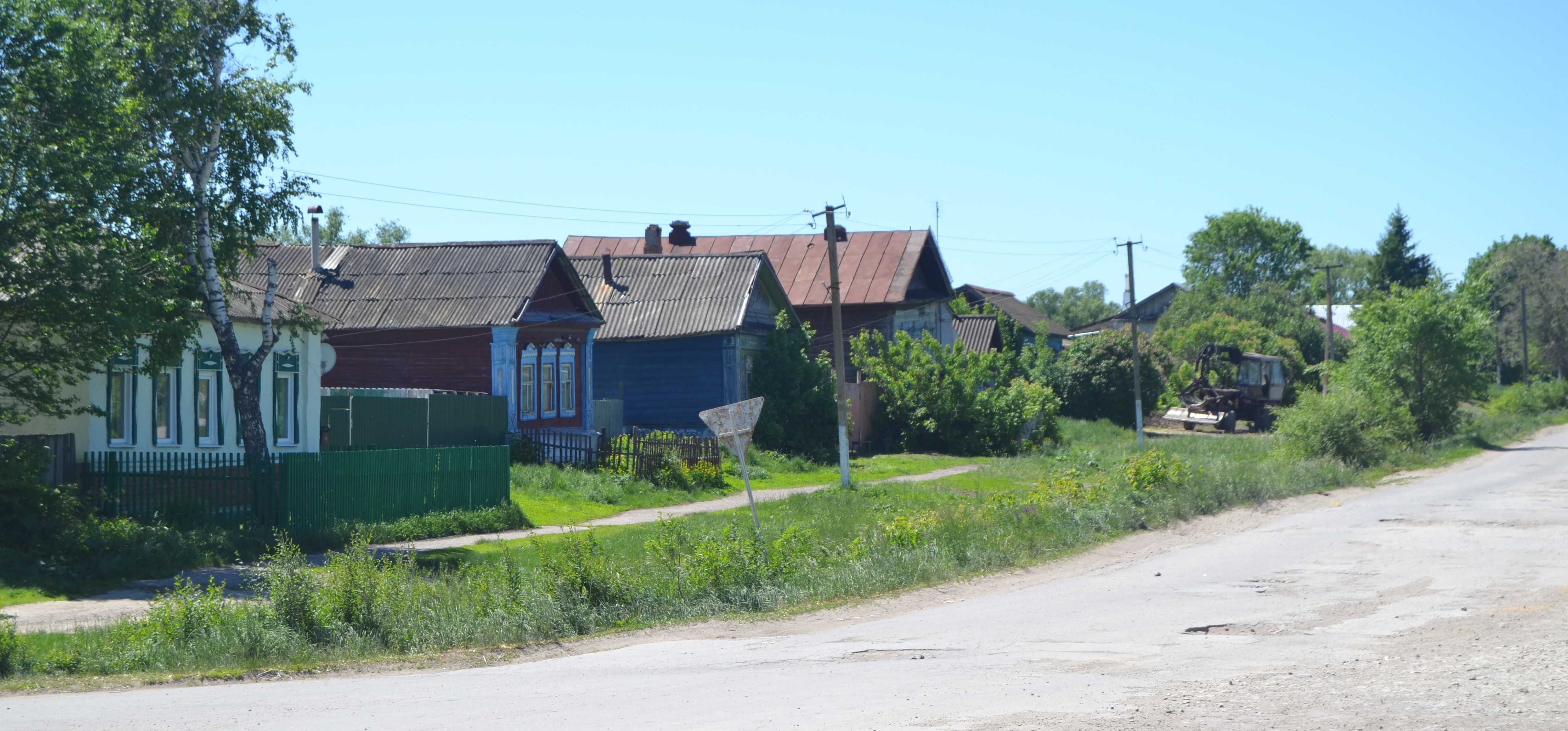 Улица Советская, расположена в селе Вязовка (Б.-Карабулакский район)